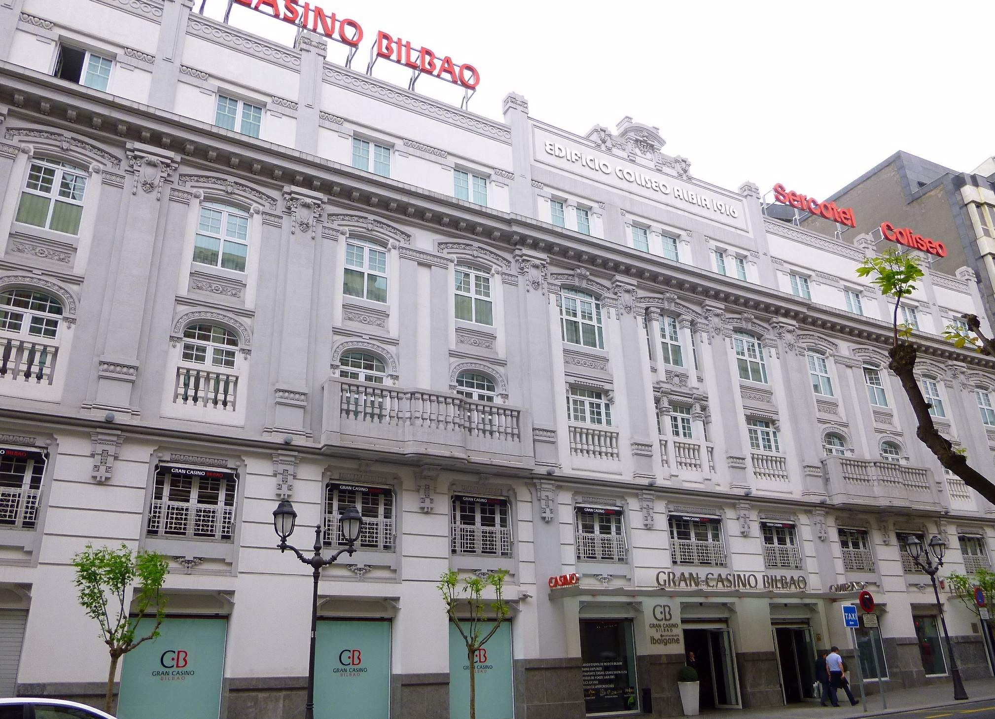 Edificio Coliseo Albia (Bilbao)